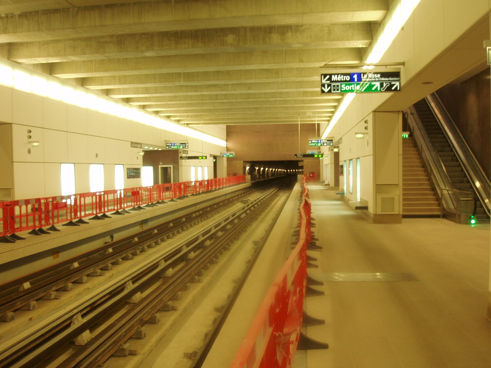 Station terminus de la ligne 1 du métro de Marseille "La Fourragère".